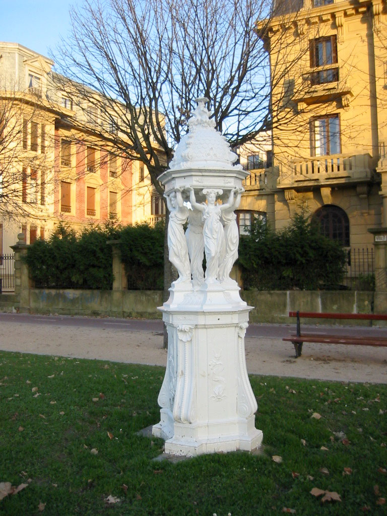 Fontaine Wallace (Fuente Wallace) en San Sebastián (España, SPAIN)